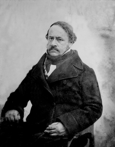 José Zapiola Cortés (Santiago de Chile, 1802 - † íd., 1885) fue un compositor chileno, destacándose su aporte a la cultura de la ciudad de Santiago.